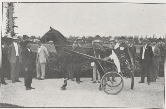 Le trotteur Custer (né en 1902) pendant sa victoire aux championnats d'Europe de 1911